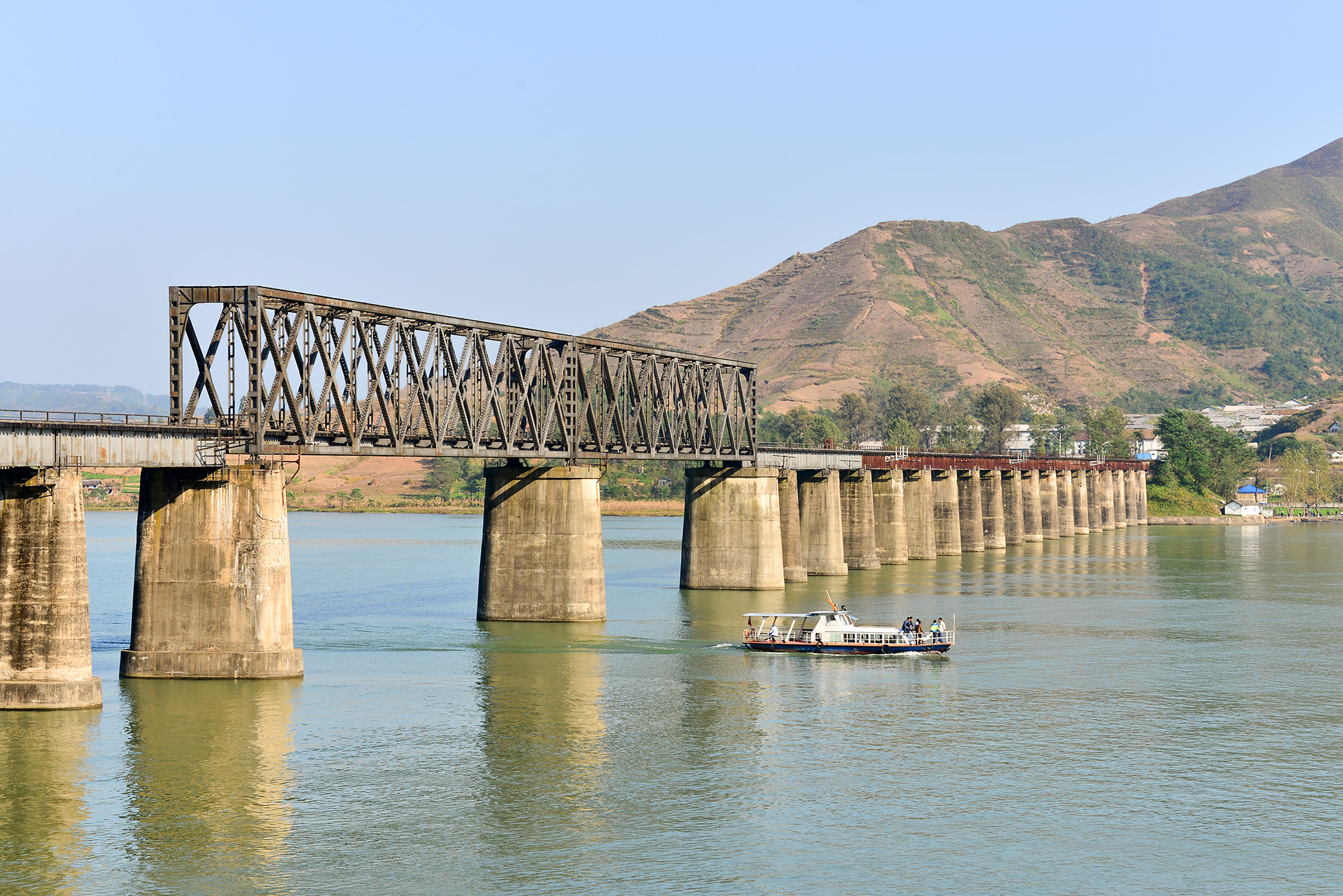 巡道工出品 Photo by Xundaogong